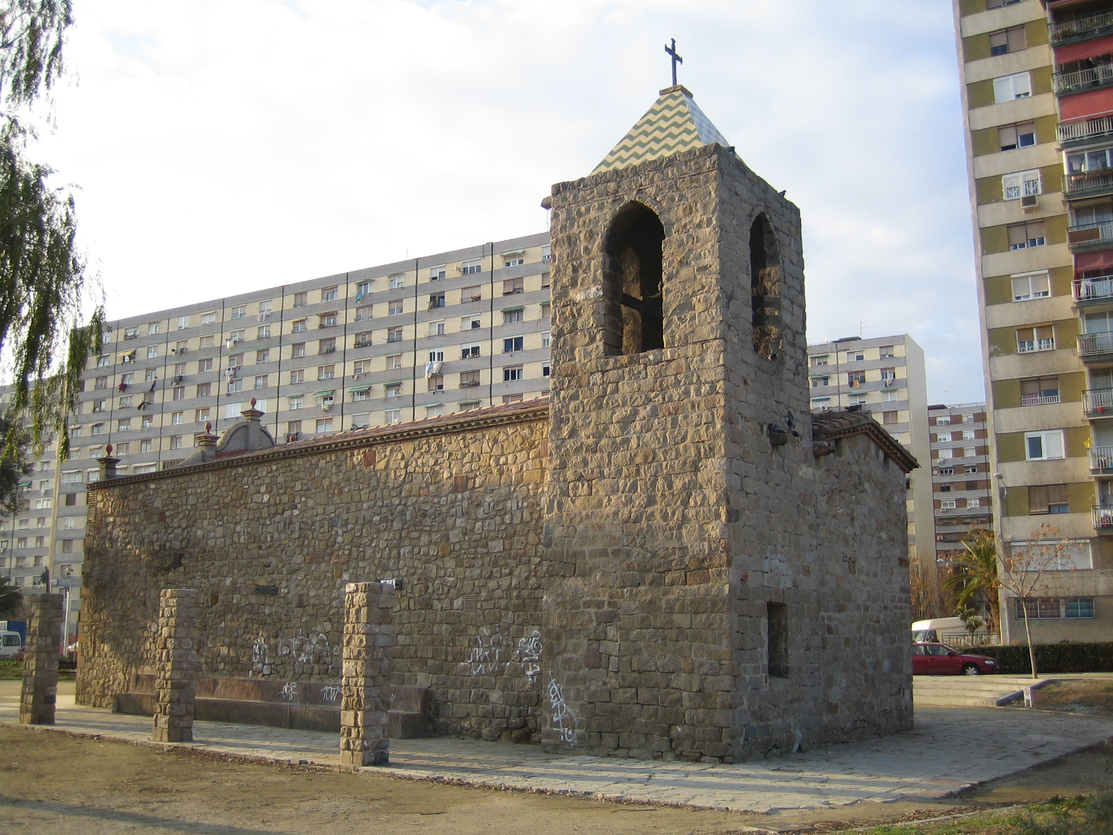 Foto hecha por mi desde Bellvitge hacía el sur en horizontal, el miércoles 01 de Marzo del 2006 a las 17:33 de la tarde. Con la cámara CANON ixus 40